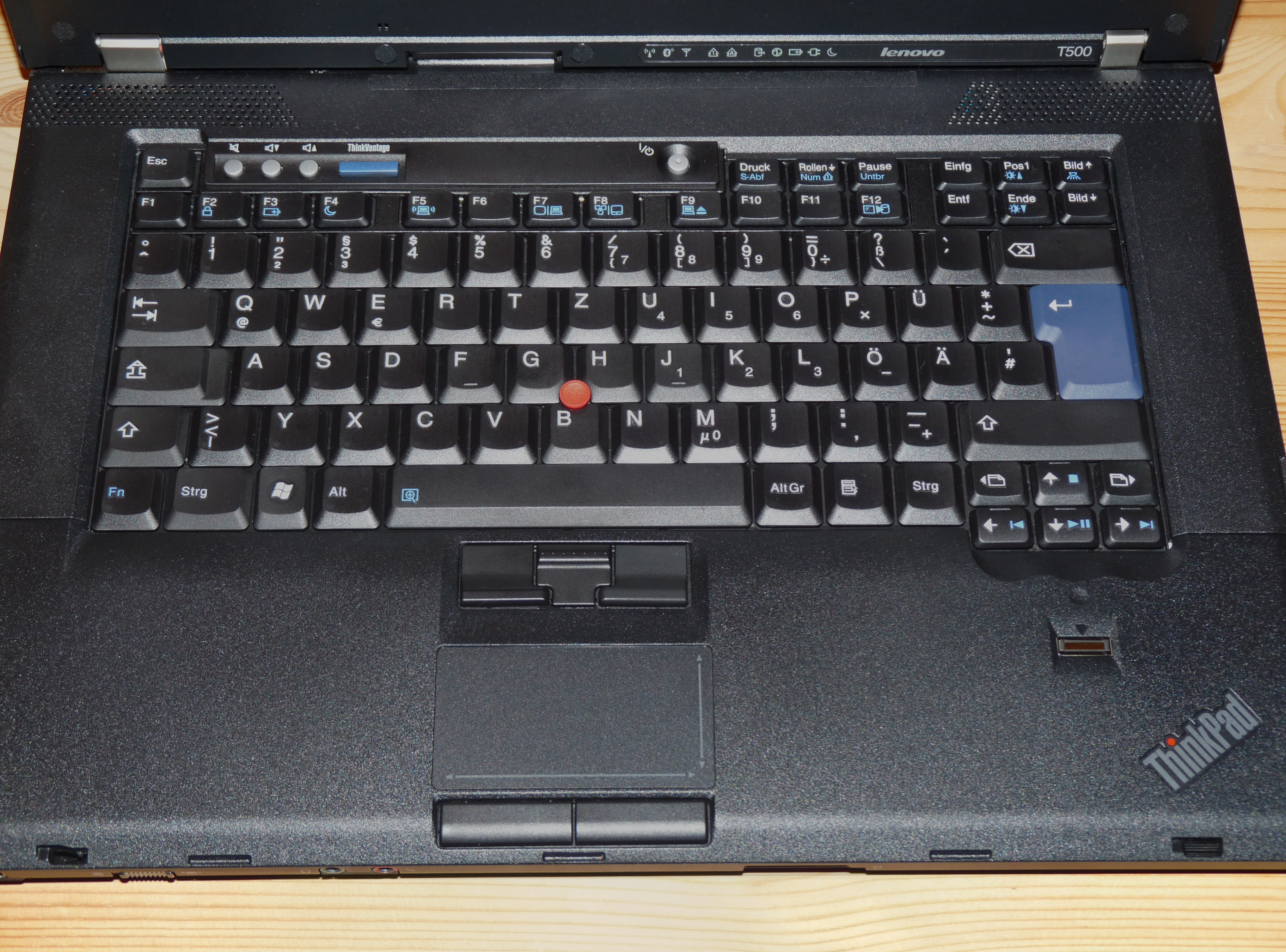 Tastatur/Eingabegeräte eines Lenovo ThinkPad T500